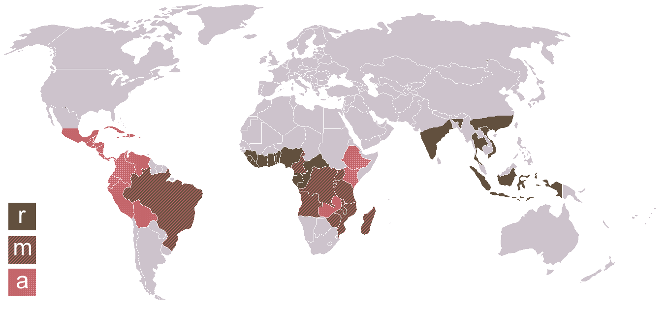 Distribución geográfica de los diferentes cultivos (r : robusta, a : arabica, m : robusta y arabica). Map of production of coffee r: culture Coffea robusta m: culture Coffea robusta & Coffea arabica. a: culture Coffea arabica.